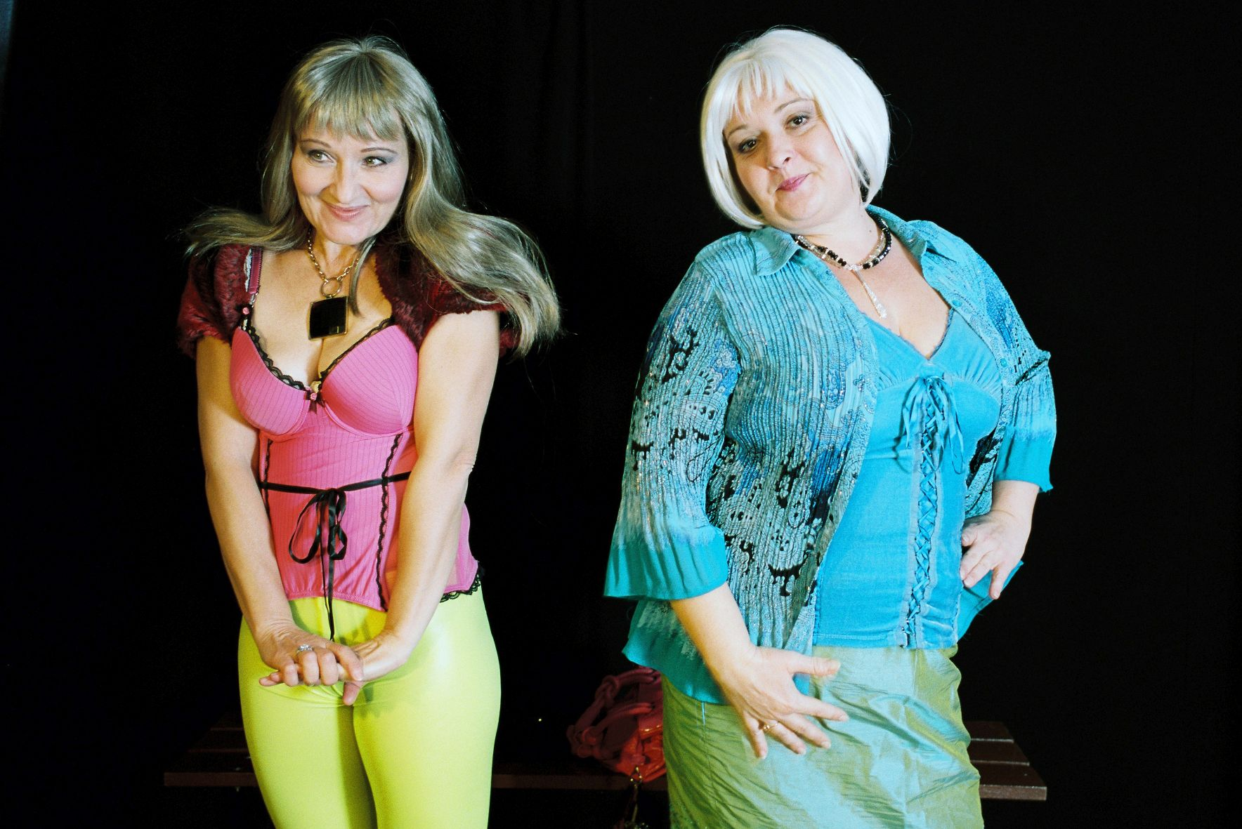 Oľga Belešová so Zuzanou Martinkovou v predstavení Baby na palube